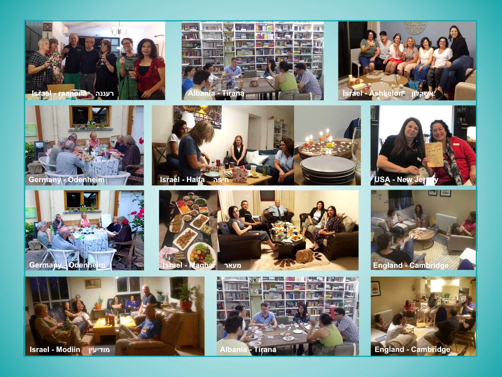 בוק סרפינג